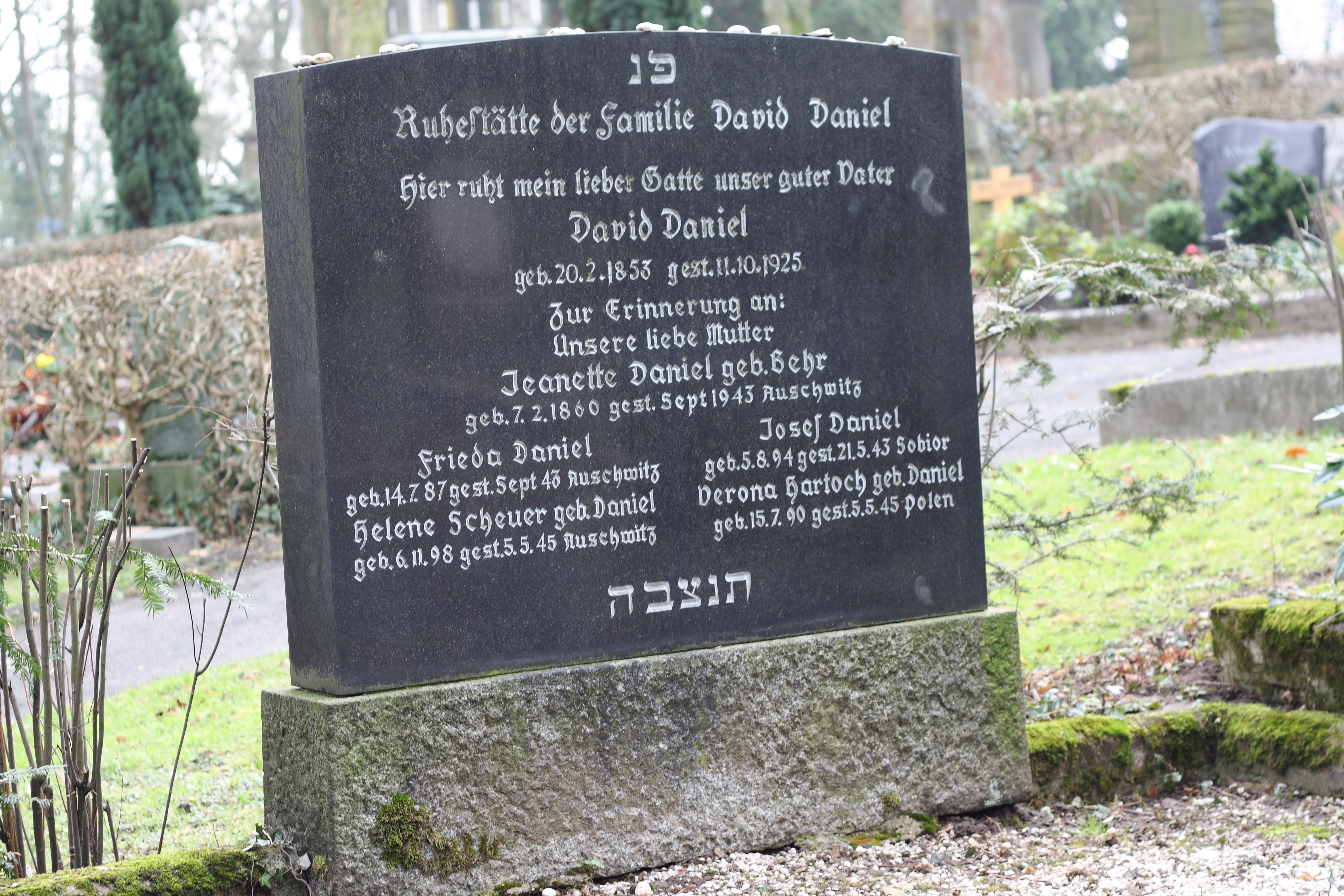 Grabstein auf dem jüdischen Friedhof in Bad Godesberg: "David Daniel geb. 20.2.1853 gest. 11.10.1925 Zur Einnerung an unsere liebe Mutter: Jeanette Daniel geb. Behr geb. 7.2.1866 gest. Sept 1943 Auschwitz" (siehe Gedenkbuch des Bundesarchivs [1]), "Frieda Daniel geb. 14.7.87 gest Sept. 43 Auschwitz" (siehe Gedenkbuch des Bundesarchivs [2]), "Helene Scheuer geb. Daniel geb. 6.11.98 gest. 5.5.45 Auschwitz" (siehe Gedenkbuch des Bundesarchivs [3]), "Josef Daniel geb. 5.8.94 gest. 21.5.43 Sobior (?)" (siehe Gedenkbuch des Bundesarchivs [4]), "Verena Hartoch geb. Daniel geb. 15.7.99 gest. 5.5.45 Polen" (siehe Gedenkbuch des Bundesarchivs [5])